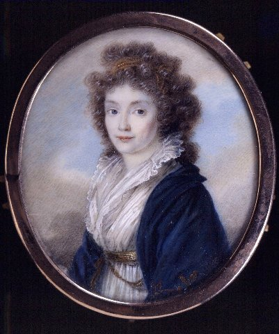 Хедвига Ульрика де ла Гарди (1761-1832)